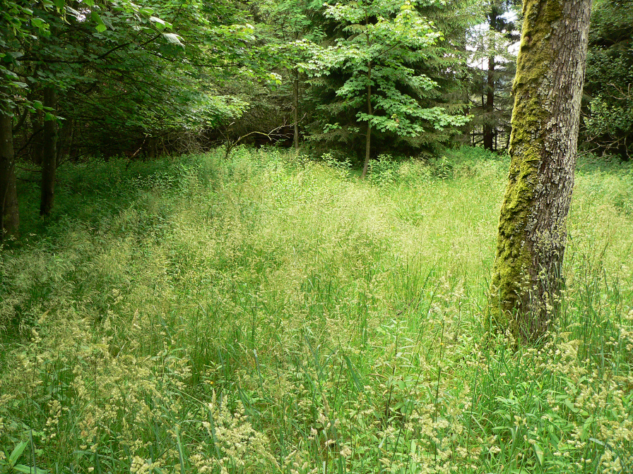 Grasfläche Burgstelle Neuschloss